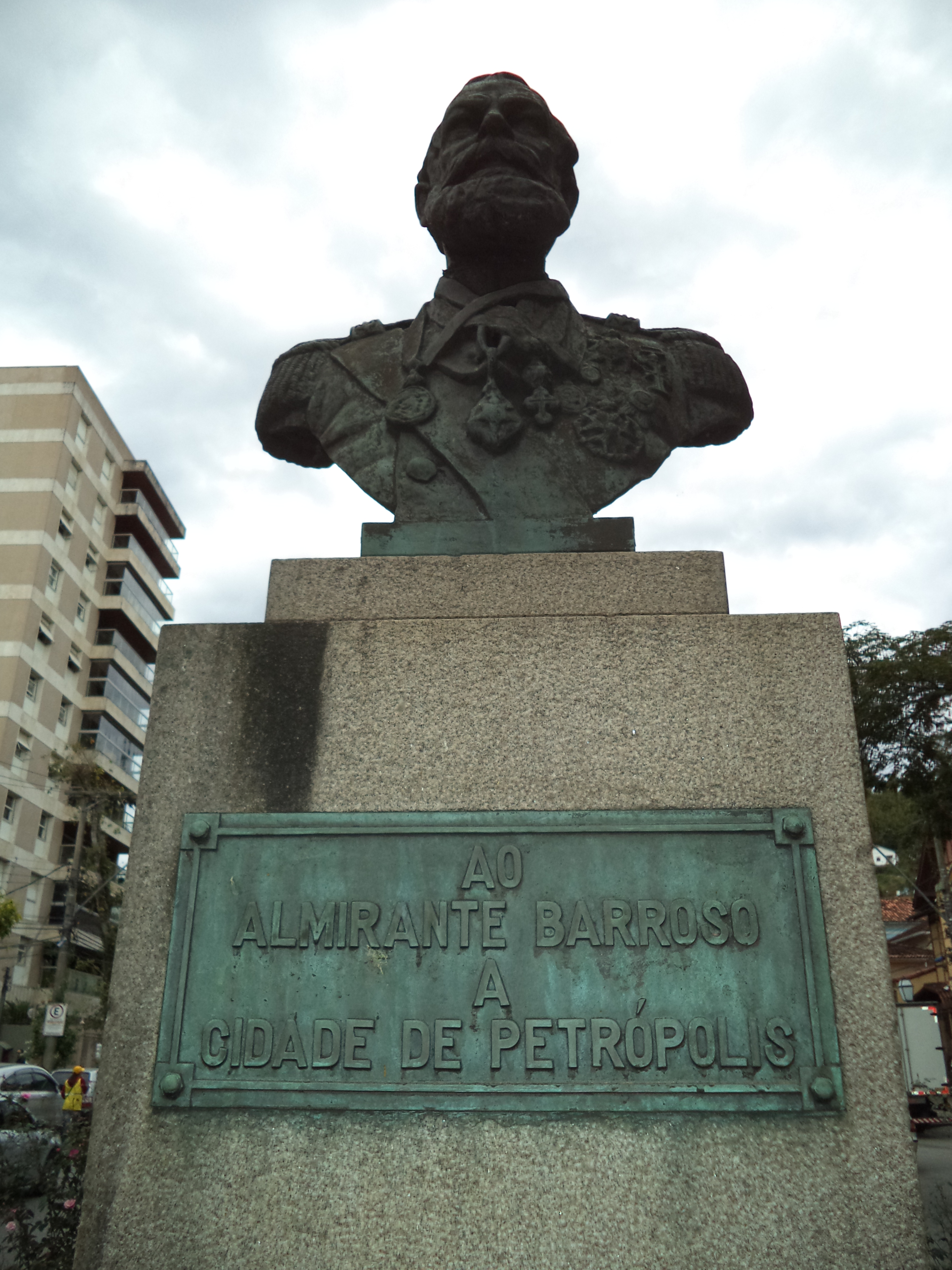 Estátua do Almirante Barroso, em Petrópolis.